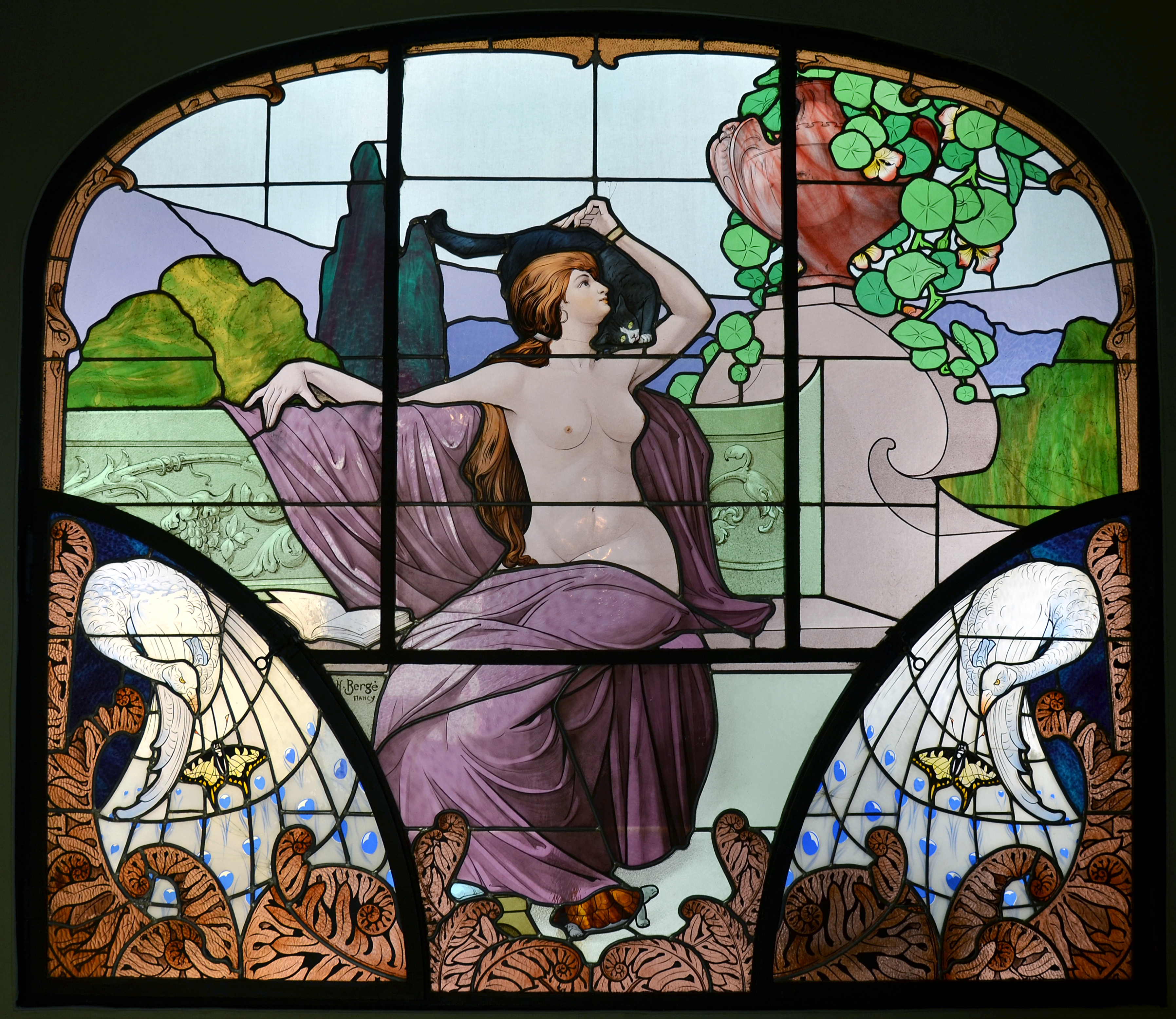 Vitrail "La Lecture" par Henri Bergé ( 1870-1937 ), Musée de l'Ecole de Nancy à Nancy. Ce vitrail provient d'une maison de la rue Gambetta à Maxéville.